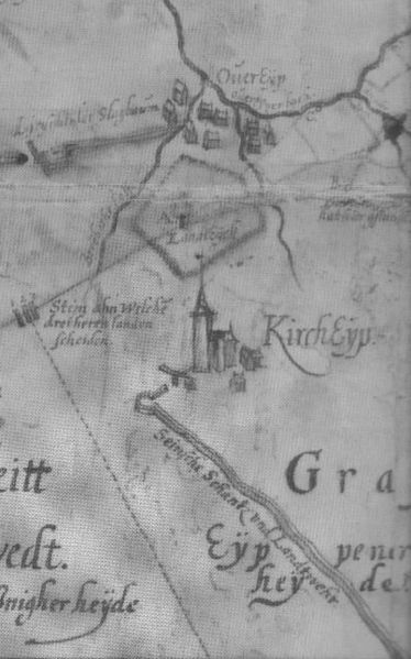 Kircheip nach einer Zeichnung von van der Weye